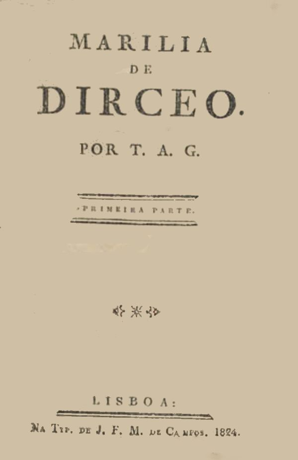 Capa de Marília de Dirceu